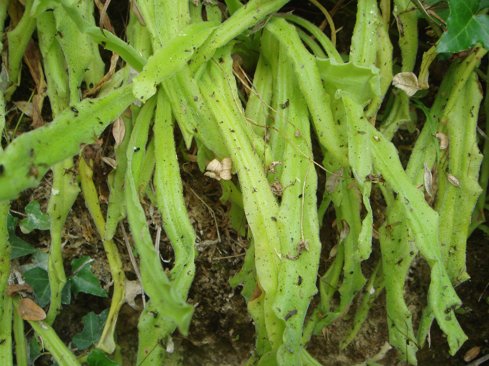 Pinguicula longifolia subsp. longifolia, Cañón de Añisclo, Pirineos, (Huesca), España